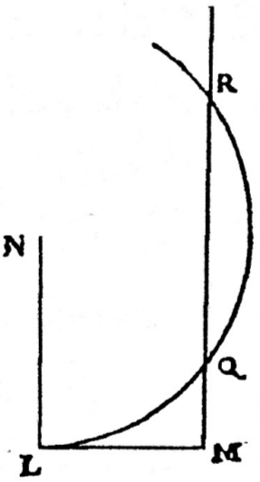 Exemple de la Geometria de Descartes